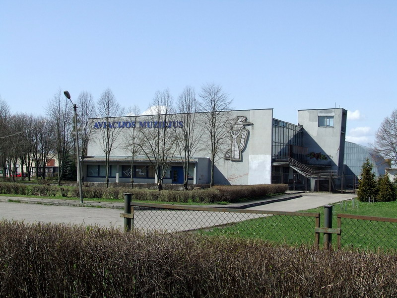 Aviacijos muziejus Kaune.